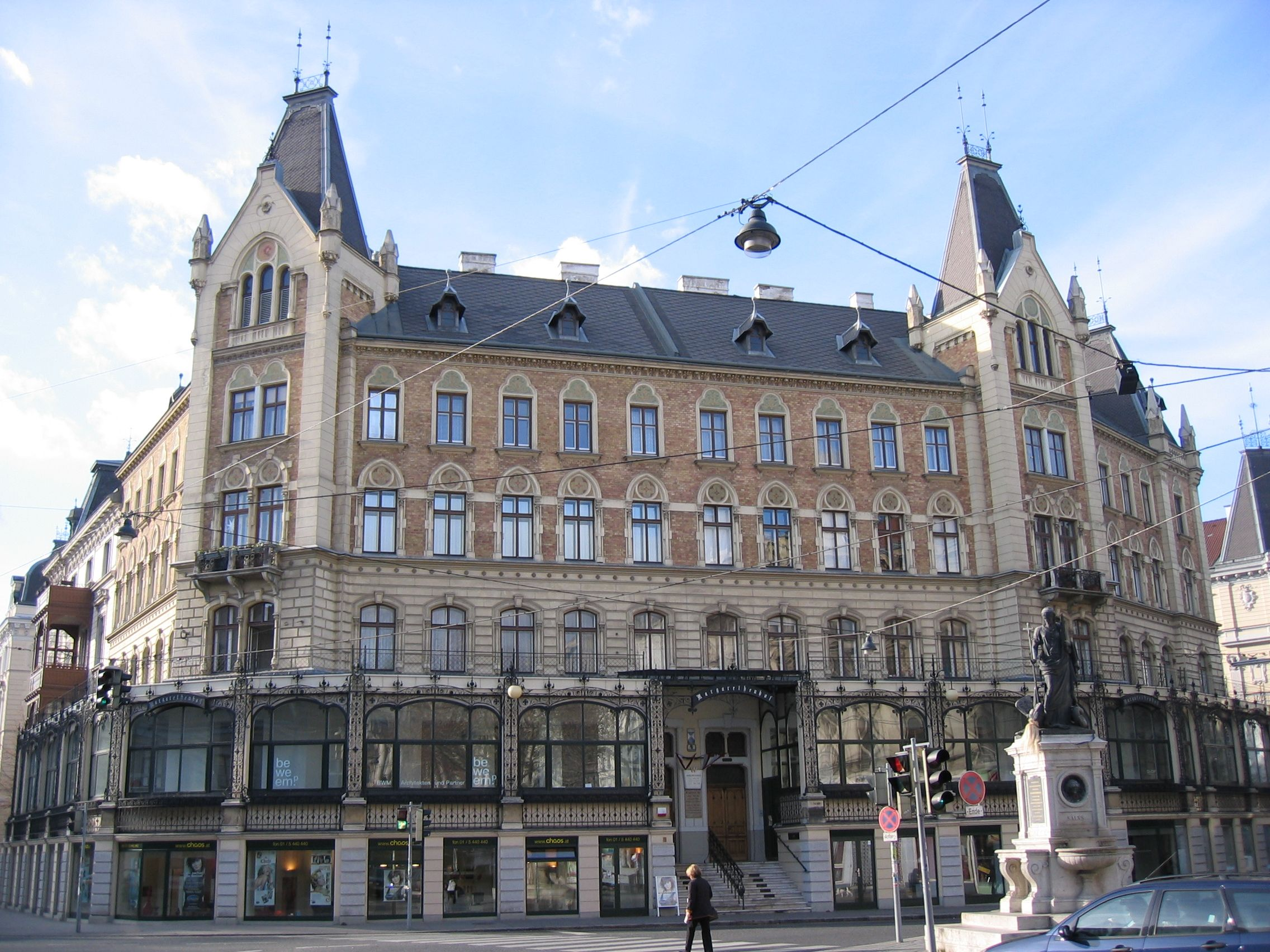 Margaretenhof mit Brunnen